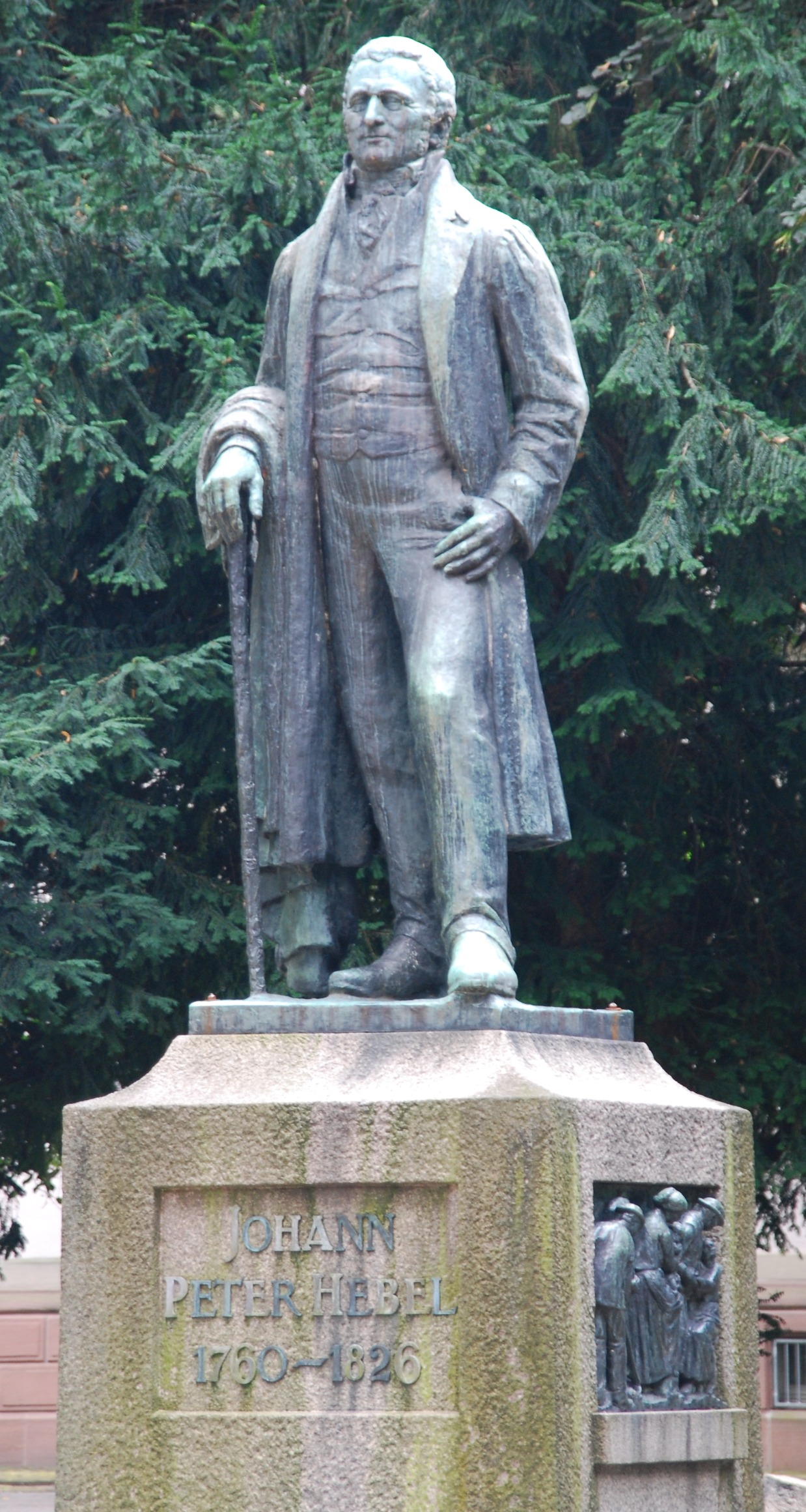 Denkmal des Dichters von Wilhelm Gerstel im Hebelpark in Lörrach.